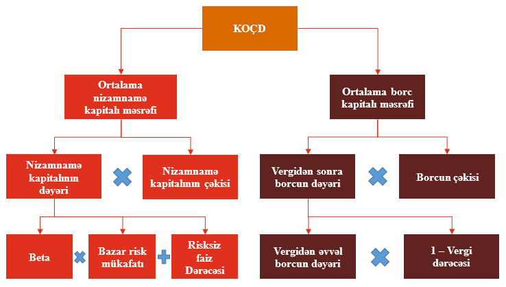 Kapitalın orta çəkili dəyəri